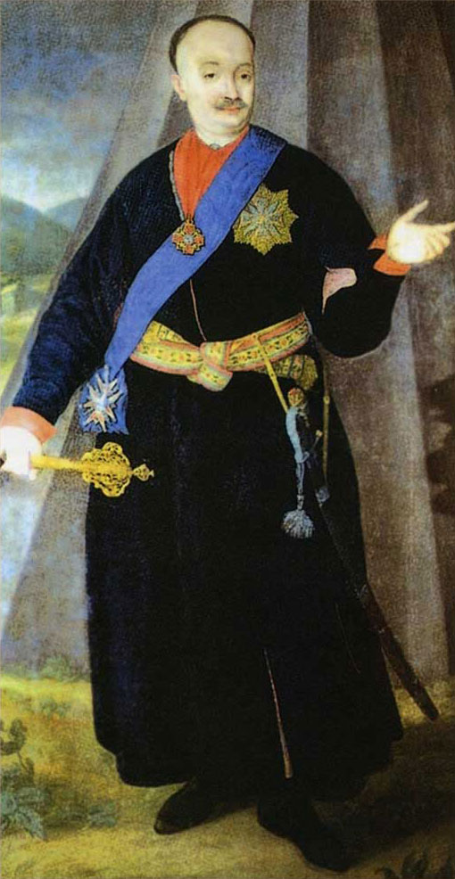 Беларуская (тарашкевіца): Партрэт Канстантына Людвіка Плятэра (Kanstantyn Ludvik Plater)